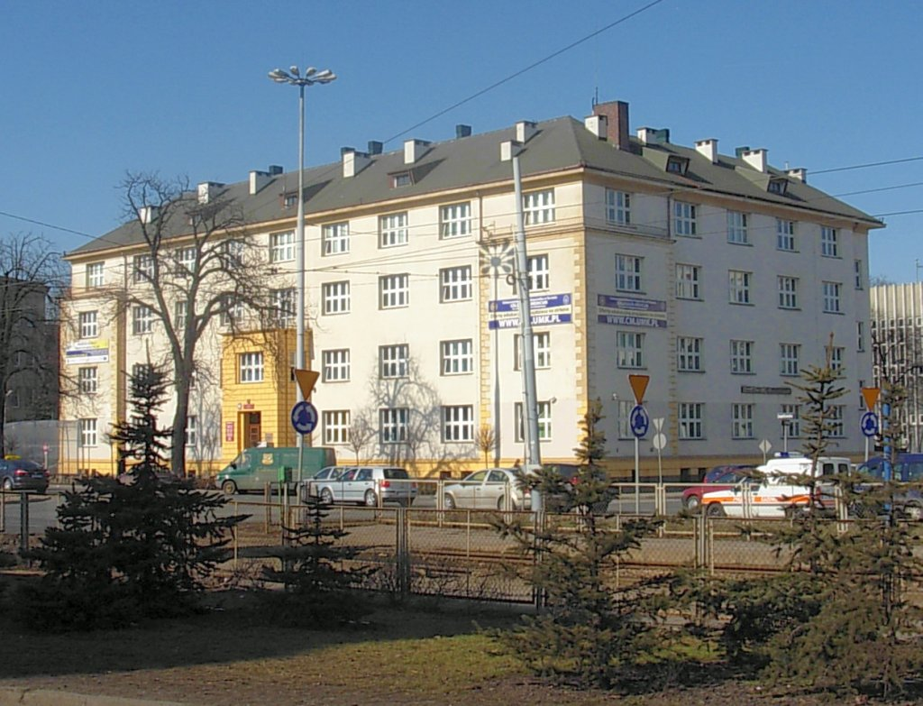 Budynek dawnego szpitala garnizonowego z 1852 r., od 2000 r. budynek administracyjny Akademii Medycznej w Bydgoszczy, od 2004 r. należy do Collegium Medicum UMK w Bydgoszczy